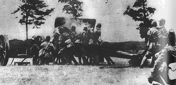 日軍炮轟宛平城。